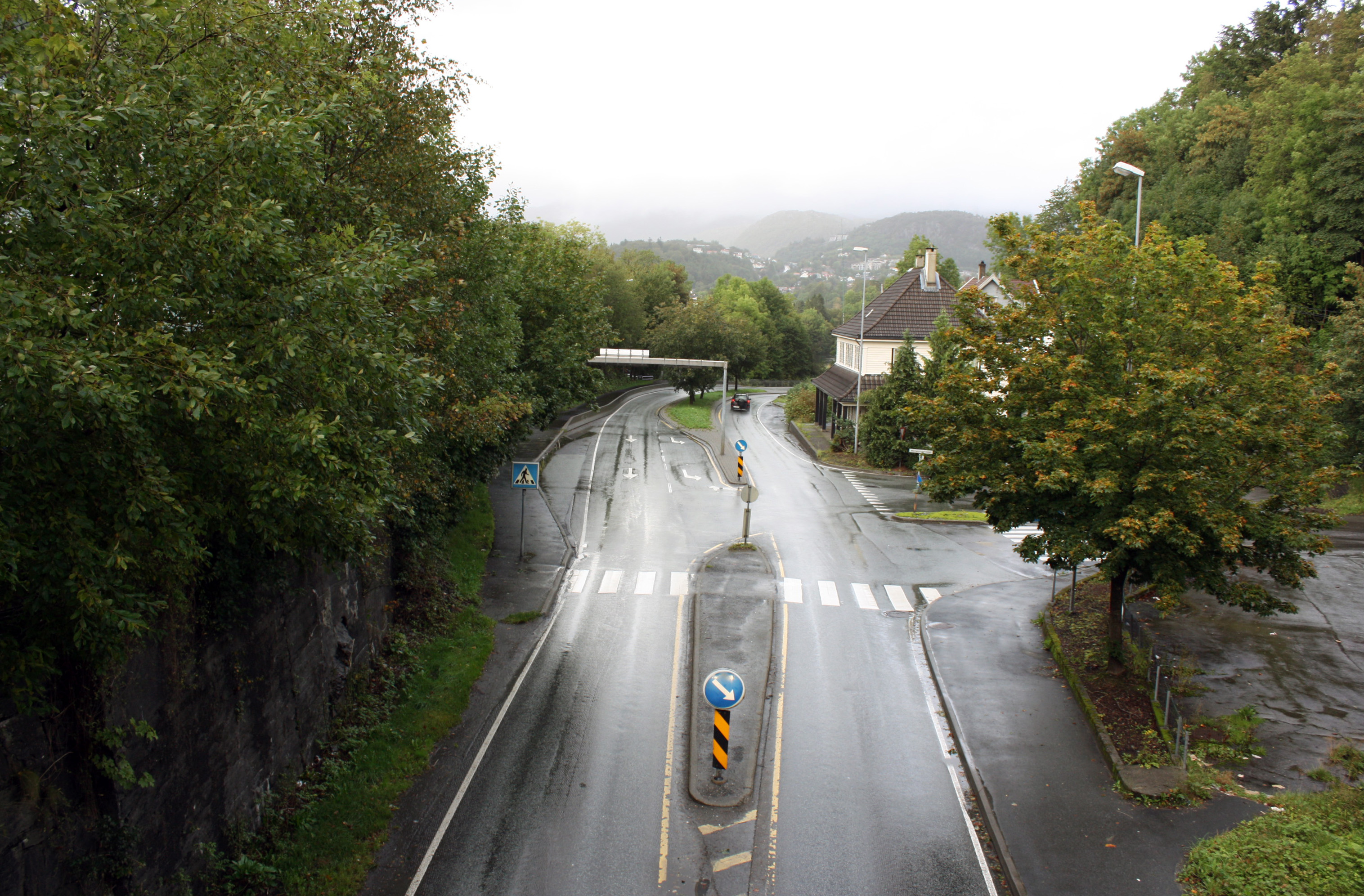 Troldhaugvegen, Fana, Bergen.